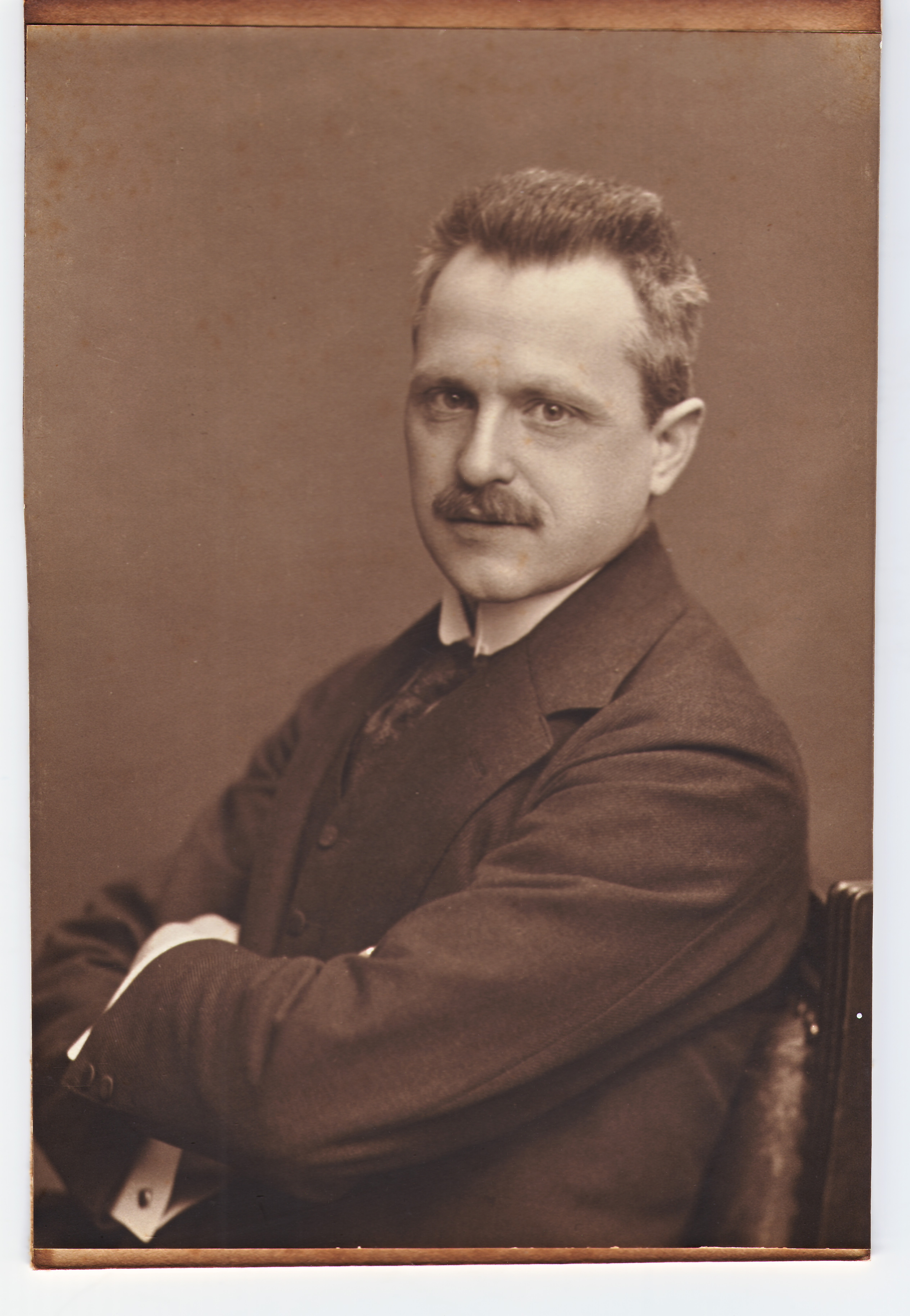 Porträt von Edmund Stiasny (ca 1910)